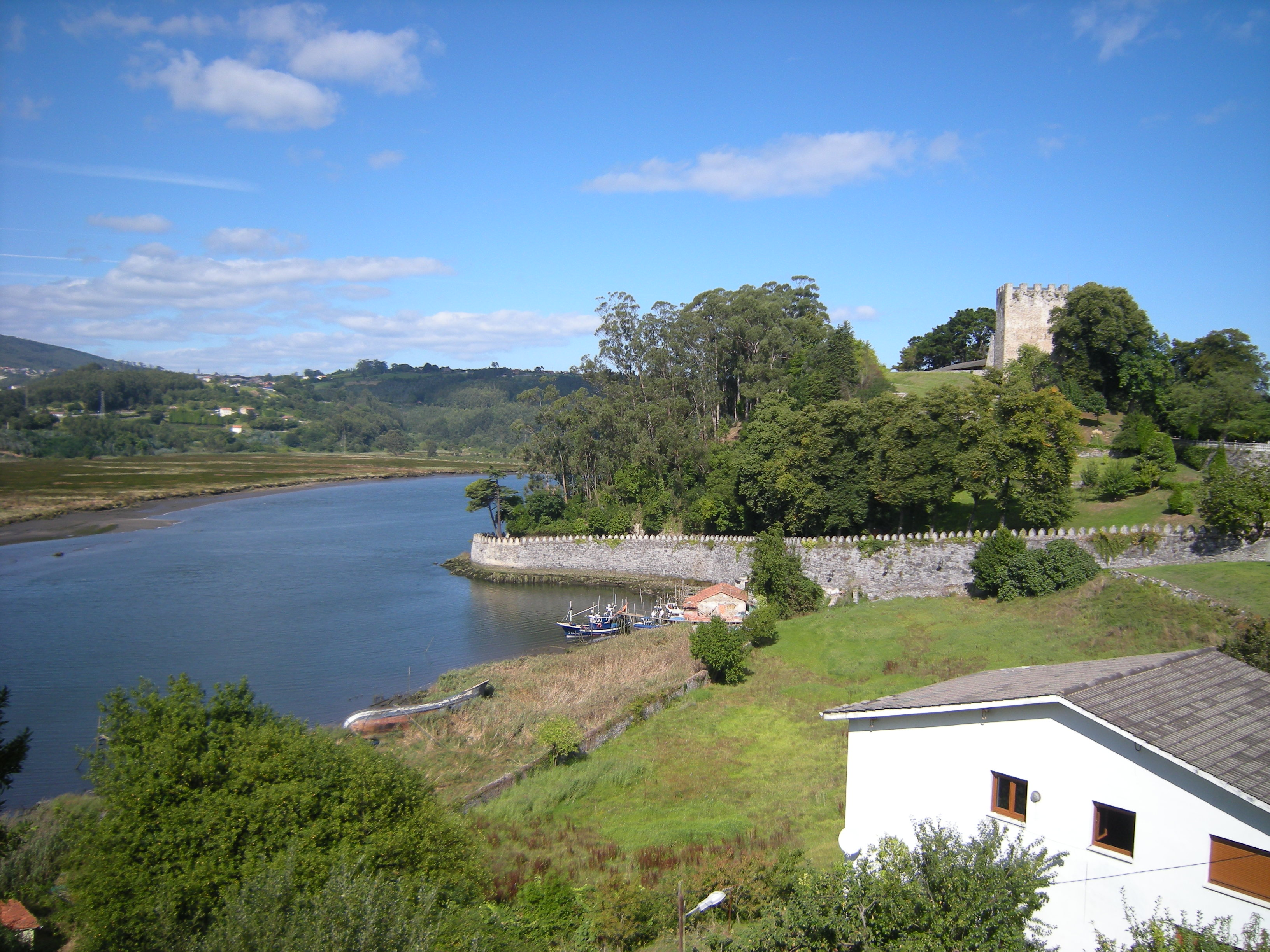 Esta foto participó en el juego En otro lugar de Flickr.